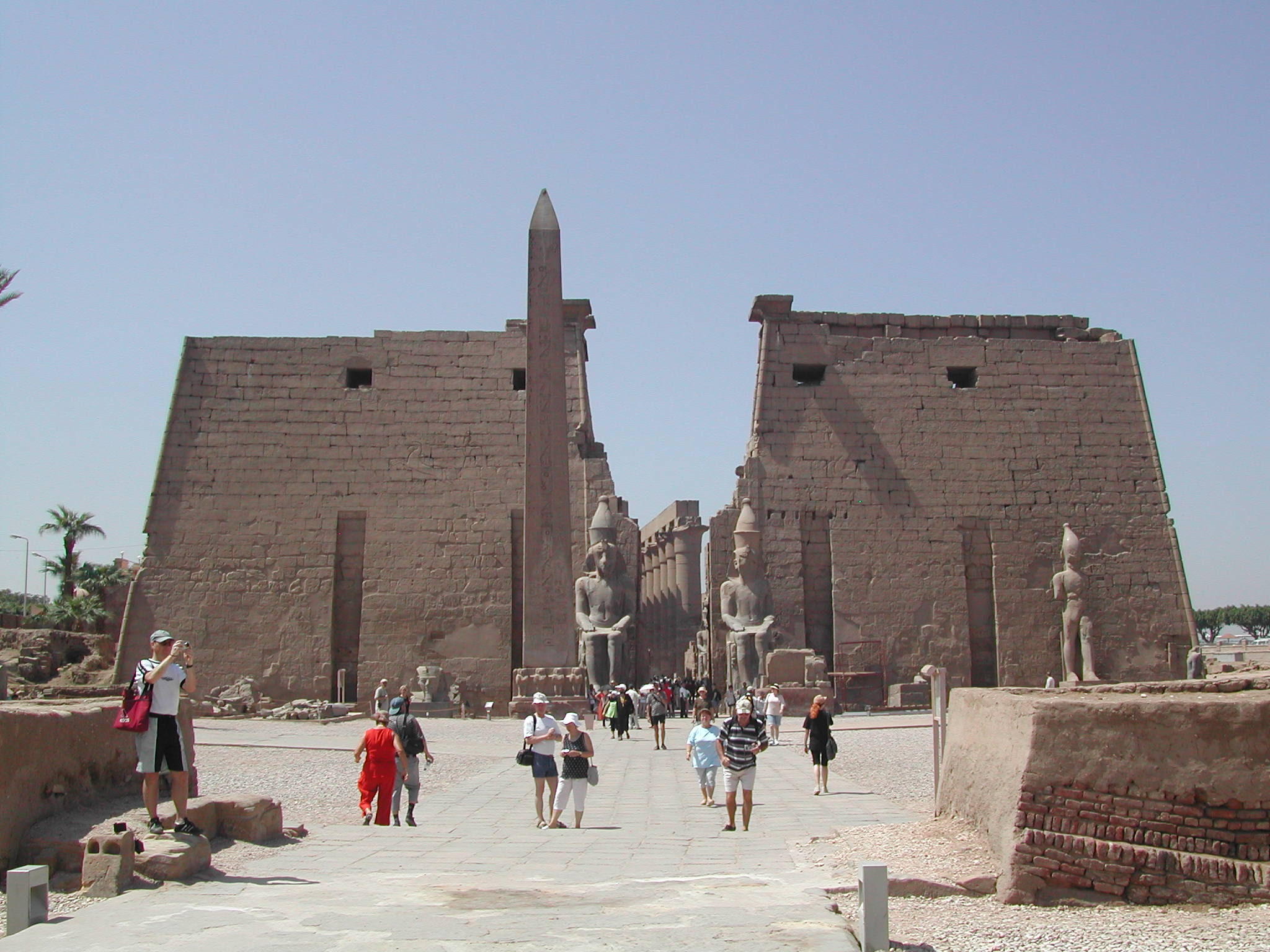 Entrée vum Luxor-Tempel